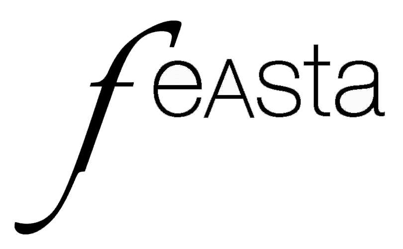 Lógó